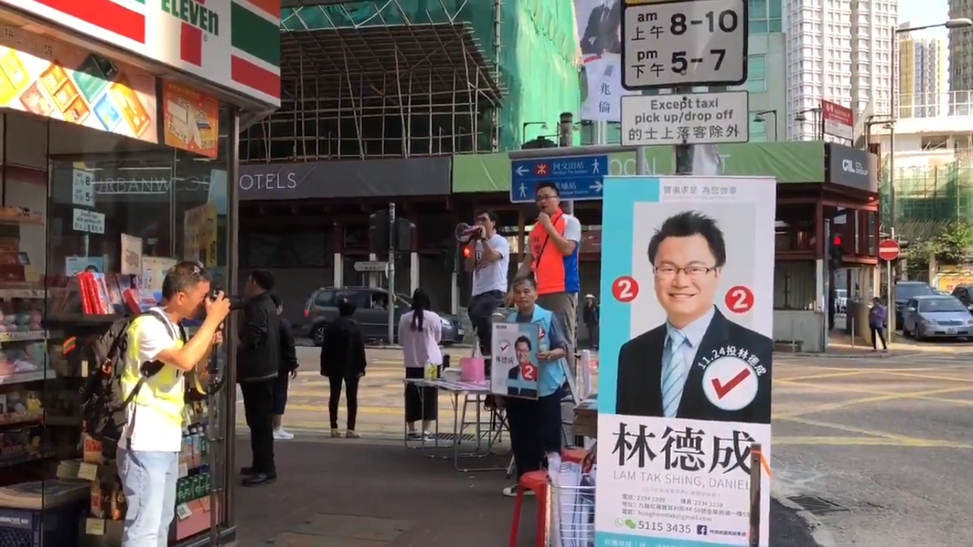 Lam Tak Shing Daniel canvassing in Hung Hom